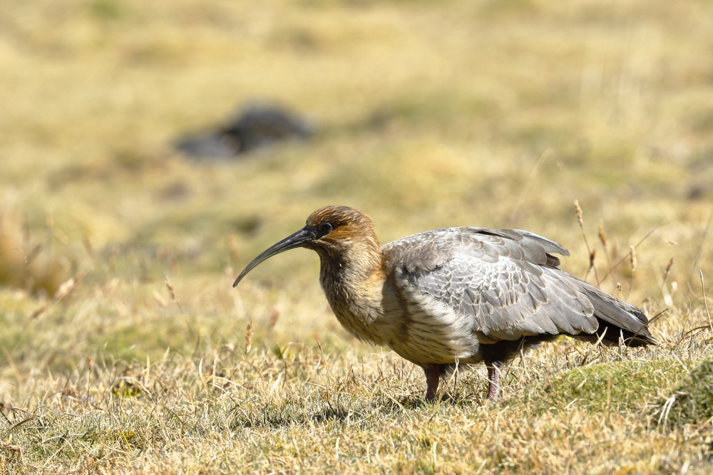 bandurria de la puna (Theristicus melanopis branickii) hallada a 4200 msnm en las faldas del nevado Huaytapallana